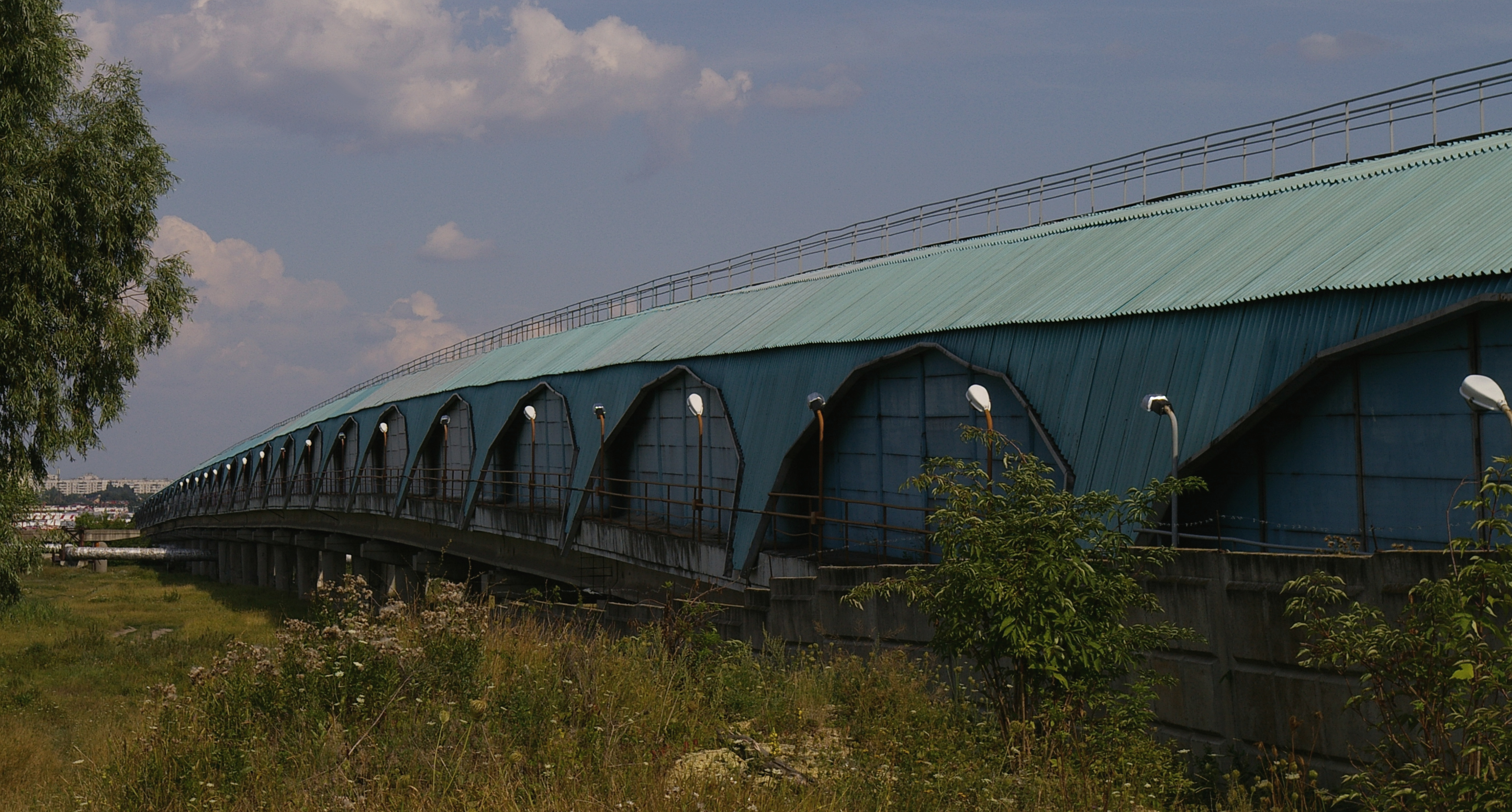 Харьков. Вид с Журавлёвки в сторону Салтовки.